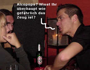 Fotoromanfoto mit Sprechblase. Eigenes Foto, eine Sprechblase eines eigenen Fotoromans mit dem Titel Stufenfestdrama Mehrere solcher Fotoromane (aus dem Biberacher Alltag mit Szene und Politik) gibt es auf der Website für Biberach.